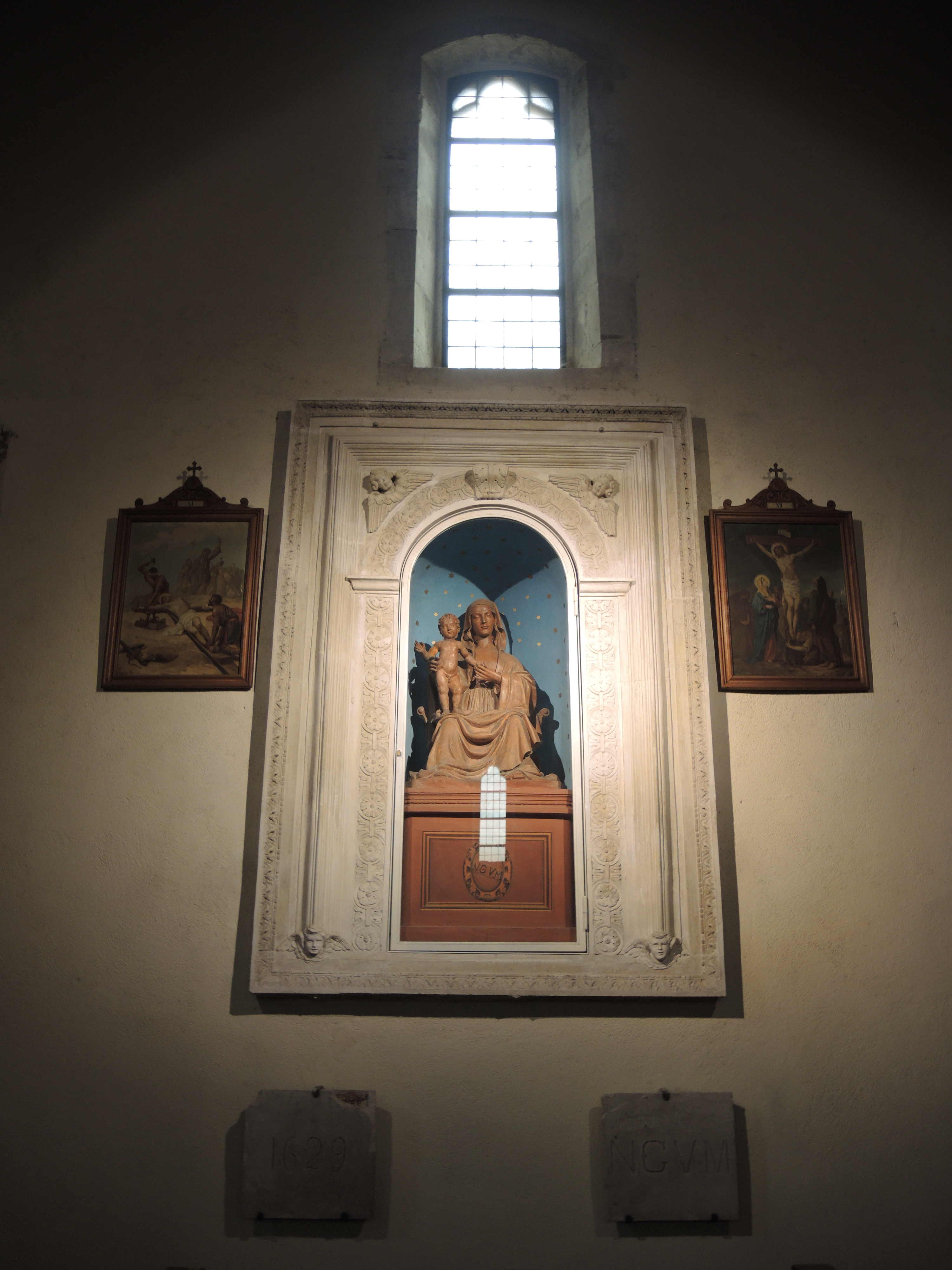 Sulmona: Chiesa di Santa Maria della Tomba